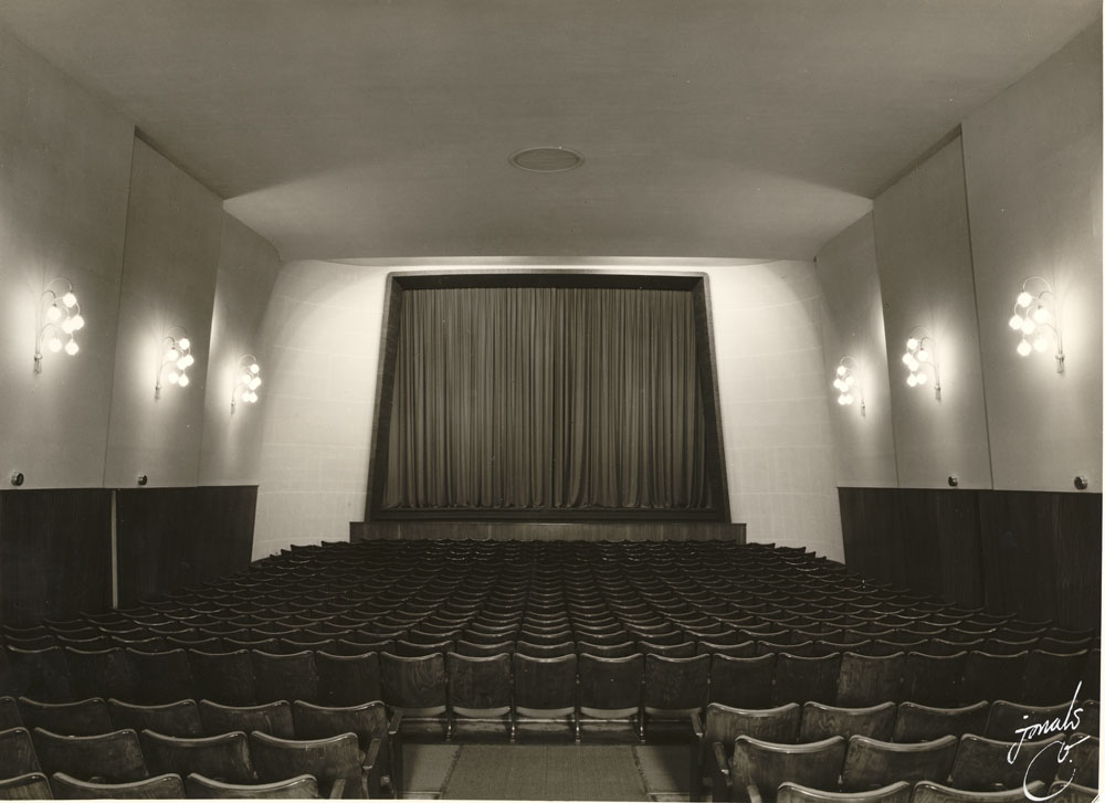 Colosseum interior 1950s